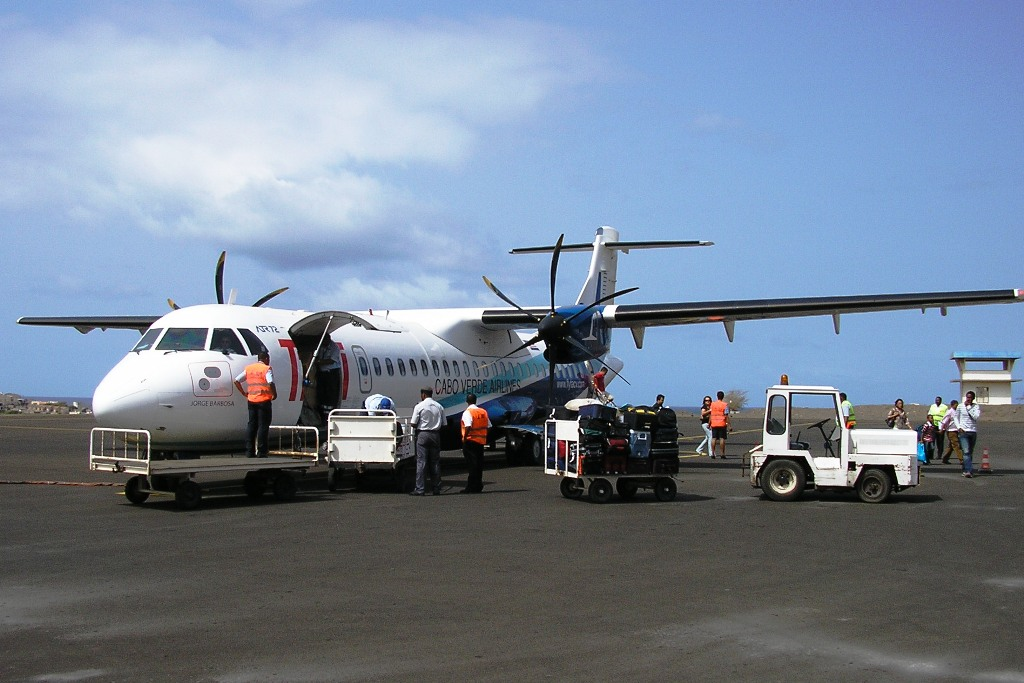 ATR 72-500 (D4-CBT) airplane of TACV at São Pedro airport, São Vicente island, Cape Verde